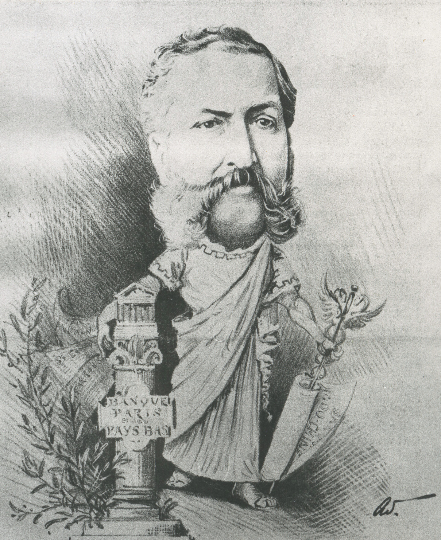 Eugène Goüin, par AS, lithographie à la une du journal « Nos financiers en robe de chambre : revue biographique et critique », 3e année n°1, 6 janvier 1891.